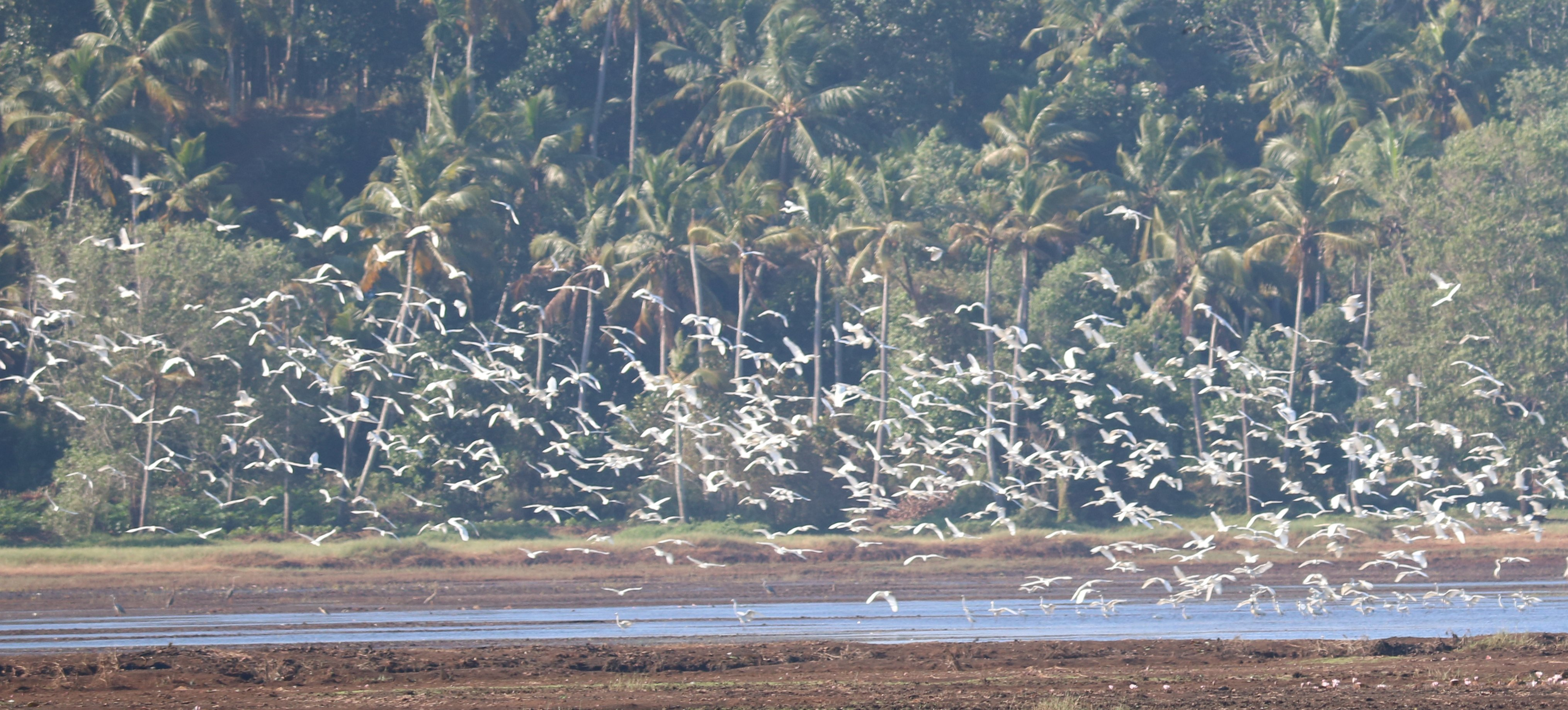 പോളച്ചിറ ഏലായിലെ ദേശാടനപക്ഷികൾ